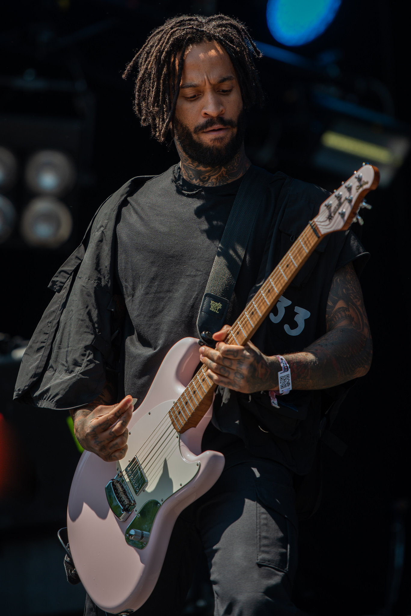 ARGO-Konzerte,Beck's Park Stage,Fever 333,Konzert,Livekonzert,Livemusik,Musik,RiP,Rock im Park 2019,Stephen Harrison